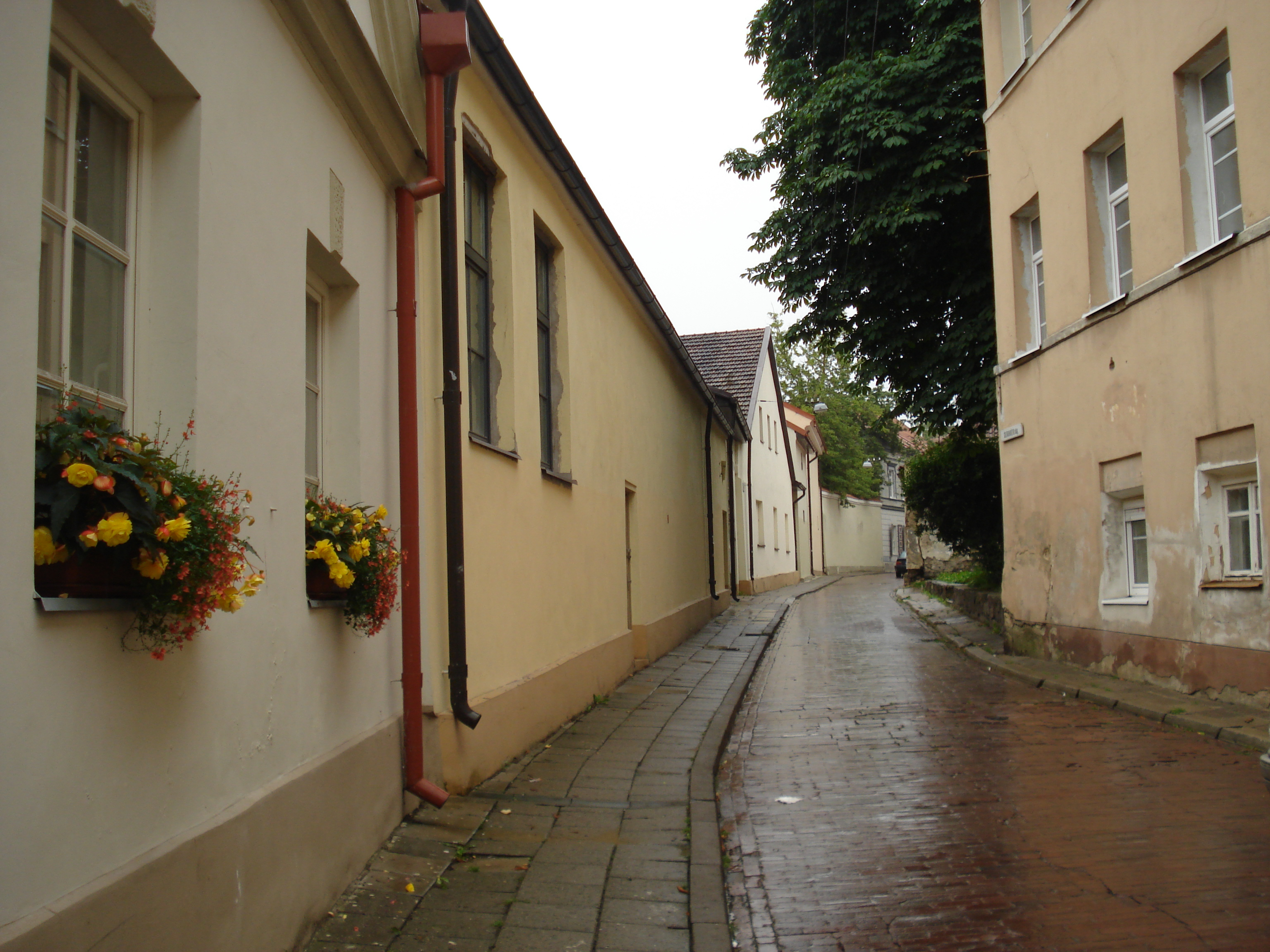 Šiltadaržio gatvė (Zaułek Literacki) in Vilnius